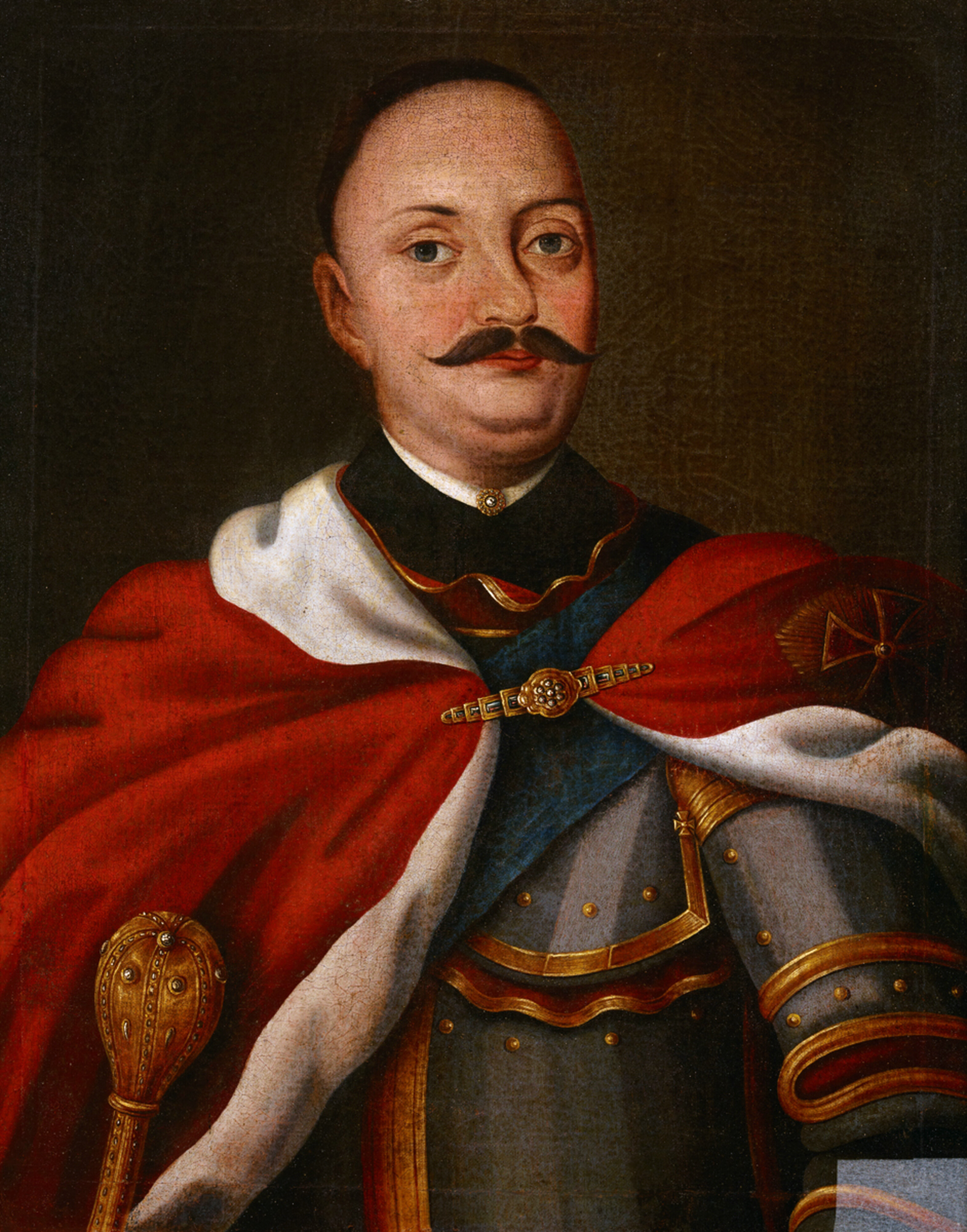 Беларуская (тарашкевіца): Партрэт гетмана Рамана Сангушкі (Raman Sanguška) (?)